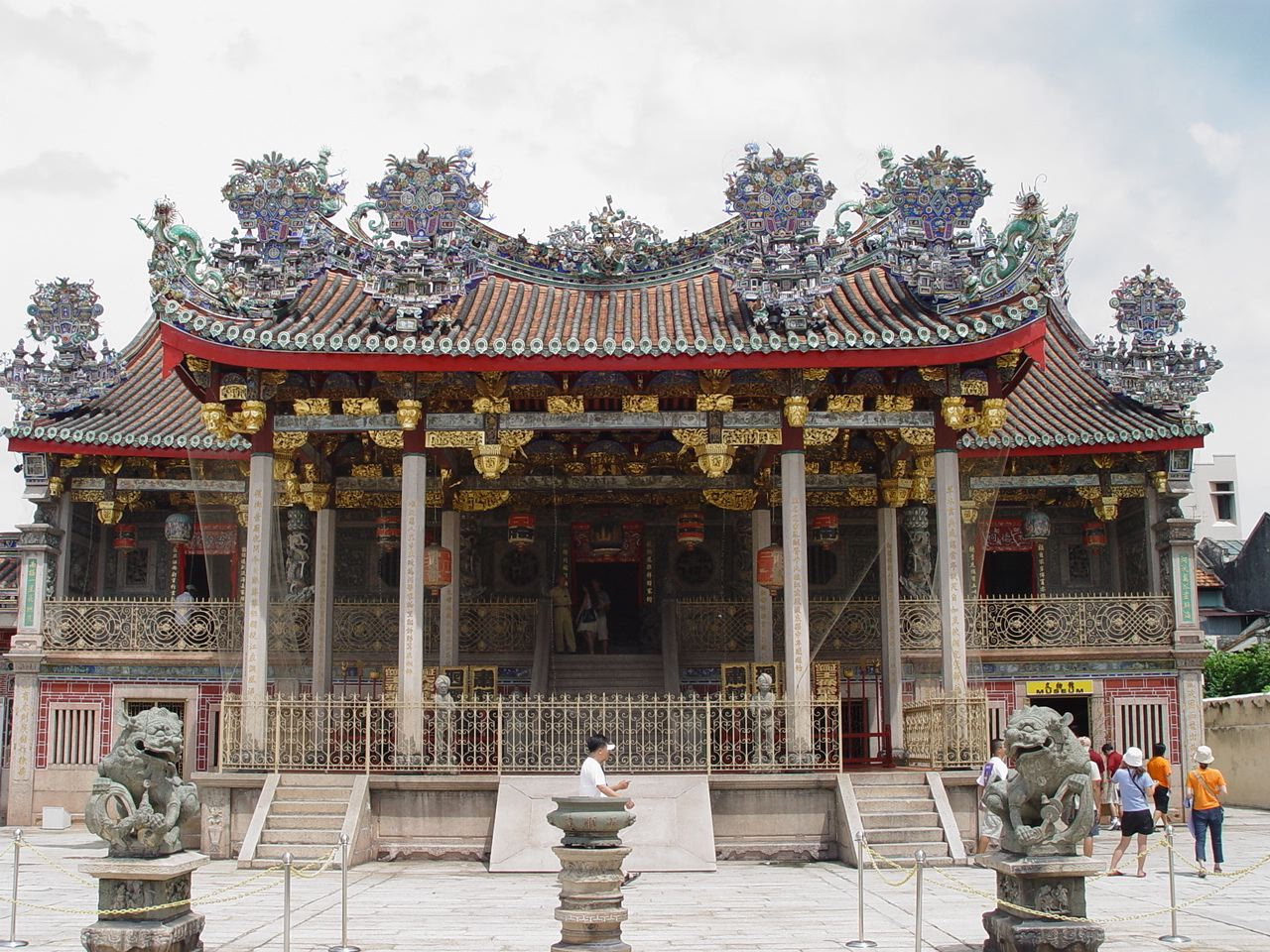 馬來西亞檳城的邱公司。是馬來西亞著名的旅遊勝地。作者：阿仁、拍摄时间：2003年1月。